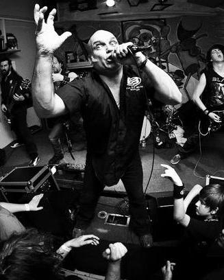 This is a picture created by me during Blaze Bayleys solo tour The King of Metal 2012 tour .